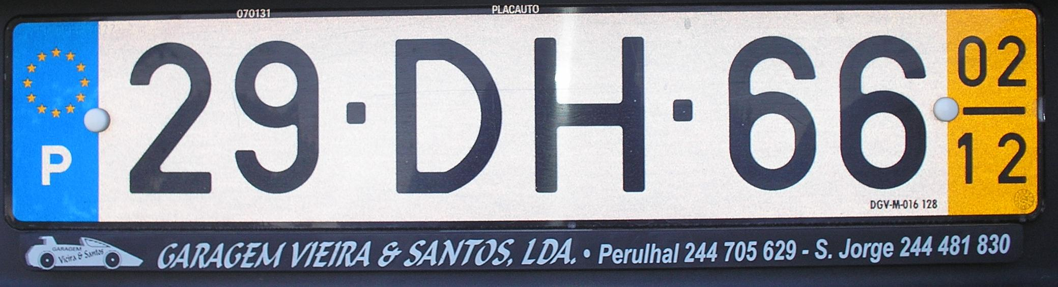 зображення номерного знаку